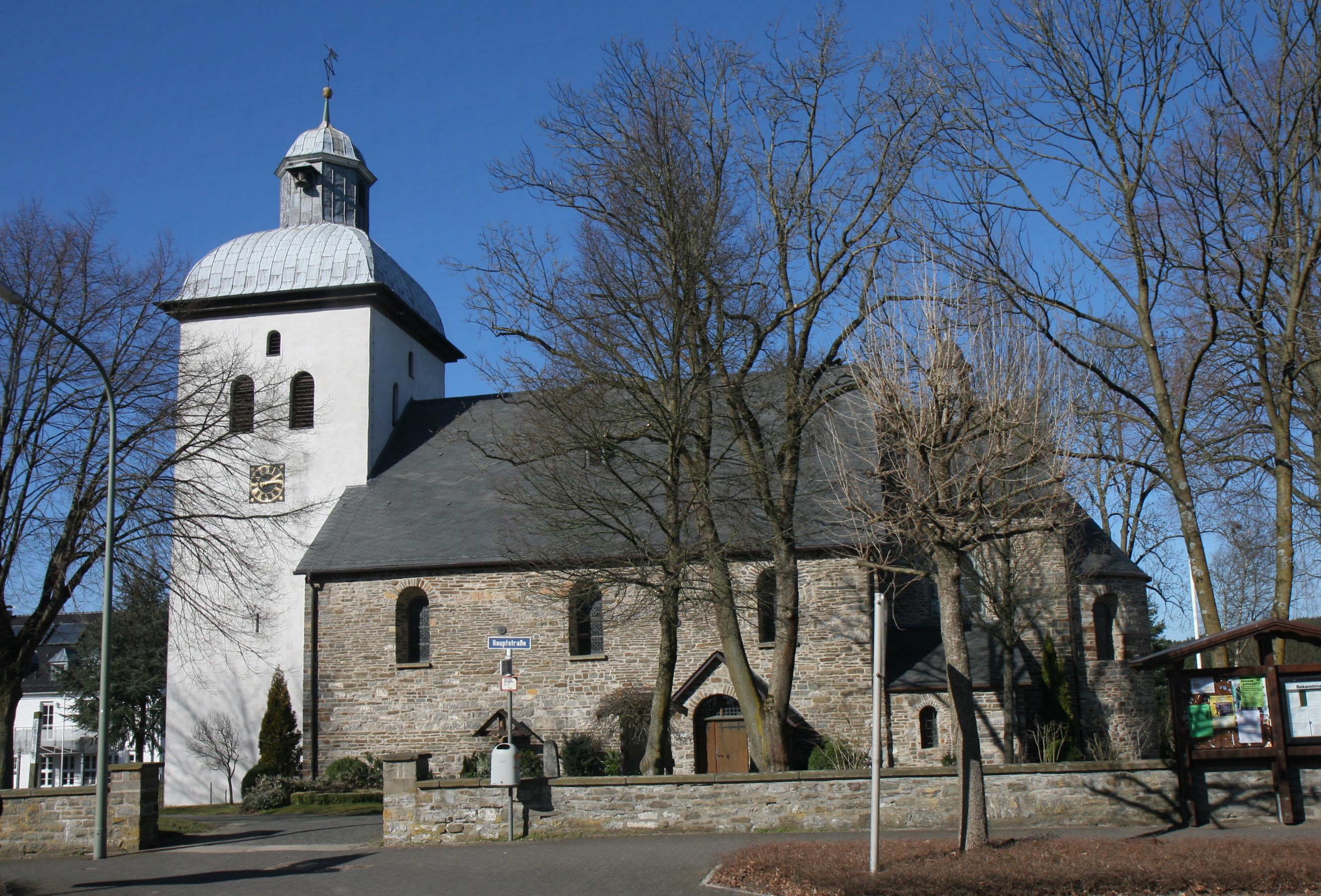 Katholische Pfarrkirche St. Lambertus in Neuenrade-Affeln, Hauptstraße 5. Spätromanische Hallenkirche, erbaut Mitte des 13. Jahrhunderts. This image shows a heritage building in Germany, located in the North Rhine-Westphalian city Neuenrade (no. 1).